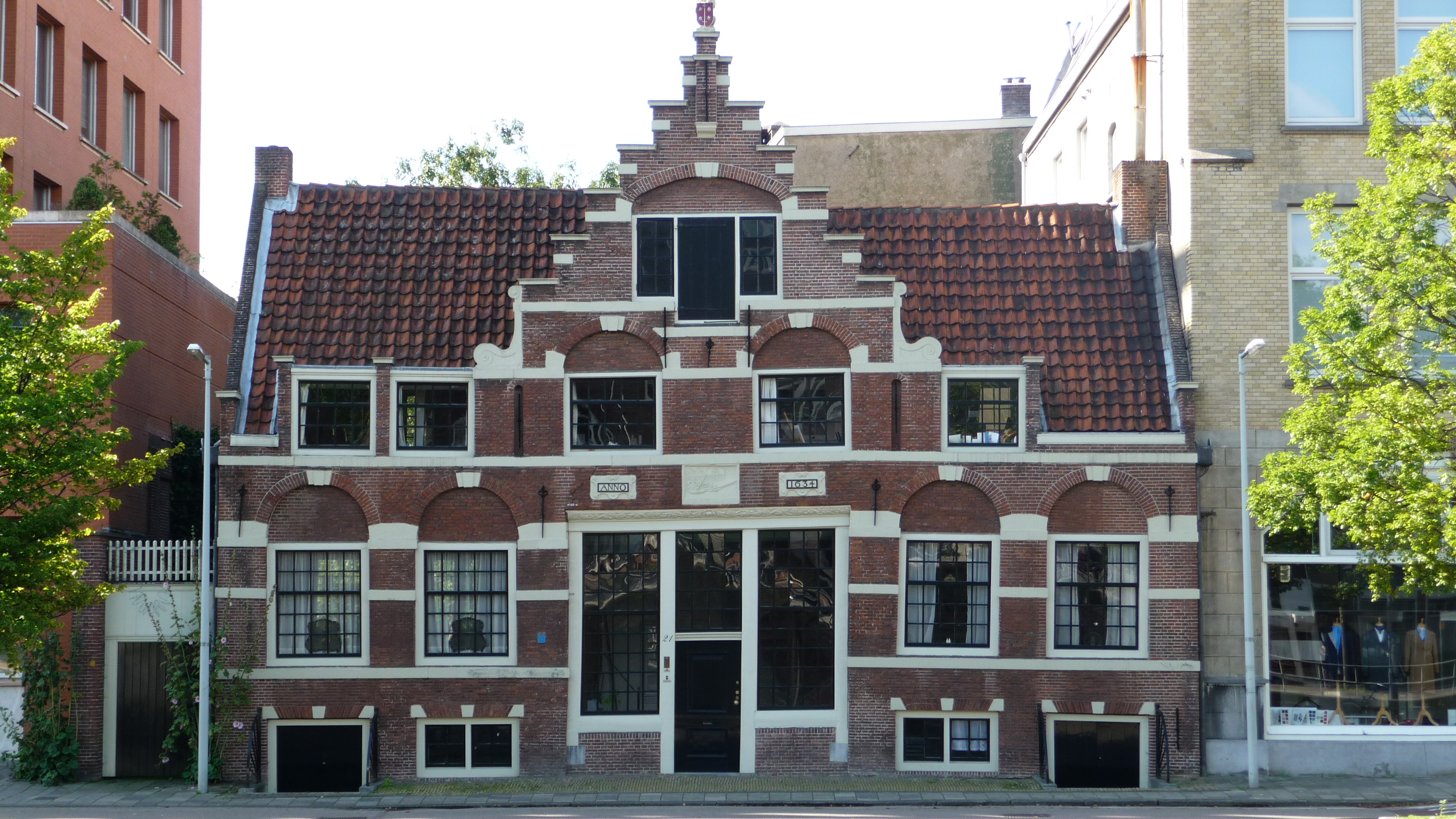 Rijksmonument Sloterkade 21, Amsterdam